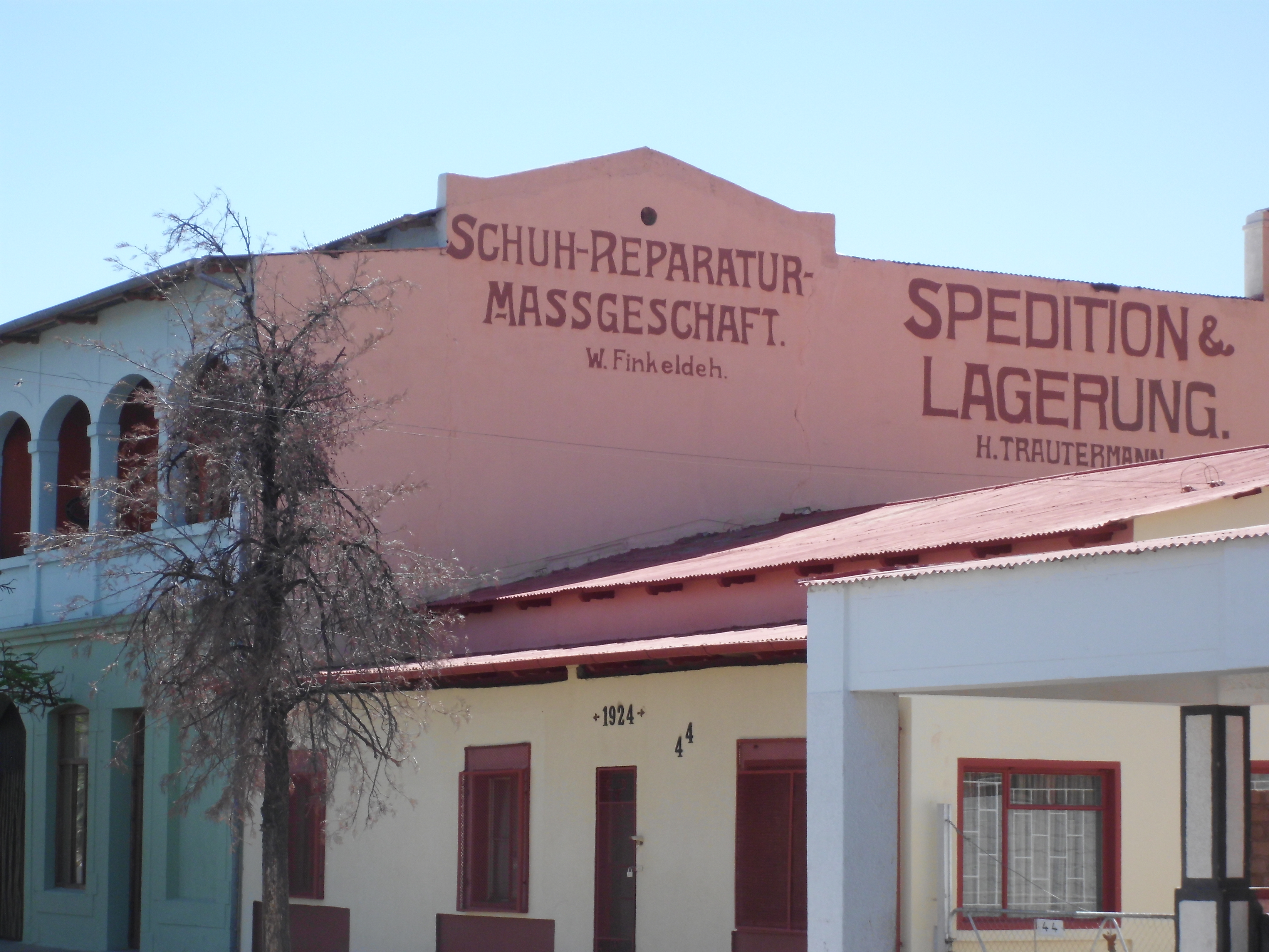 deutschsprachige Fassadenwerbung in Usakos, Namibia